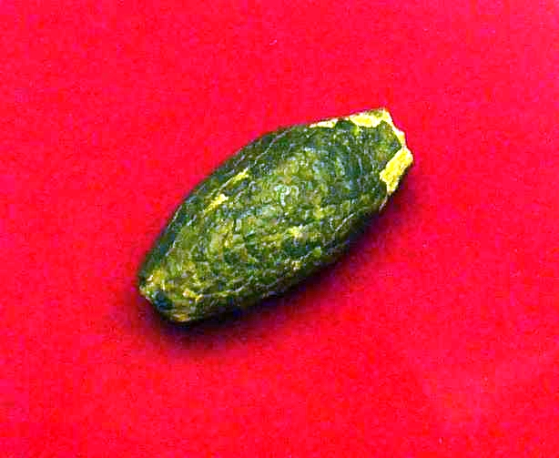 Römisches Schleuderblei, gefunden im Bereich des Tores vier auf dem äußeren Wall des Dünsberg in Biebertal-Fellingshausen; das Schleuderbeil deutet auf die Anwesenheit von Hilfstruppen aus dem Mittelmeergebiet in der Zeit zwischen 12 v. Chr. und 14 n. Chr. während augusteischer Feldzüge; Vor- und Frühgeschichtliche Sammlung im Wallenfels'schen Haus in Gießen; Inventarnummer OM 2401